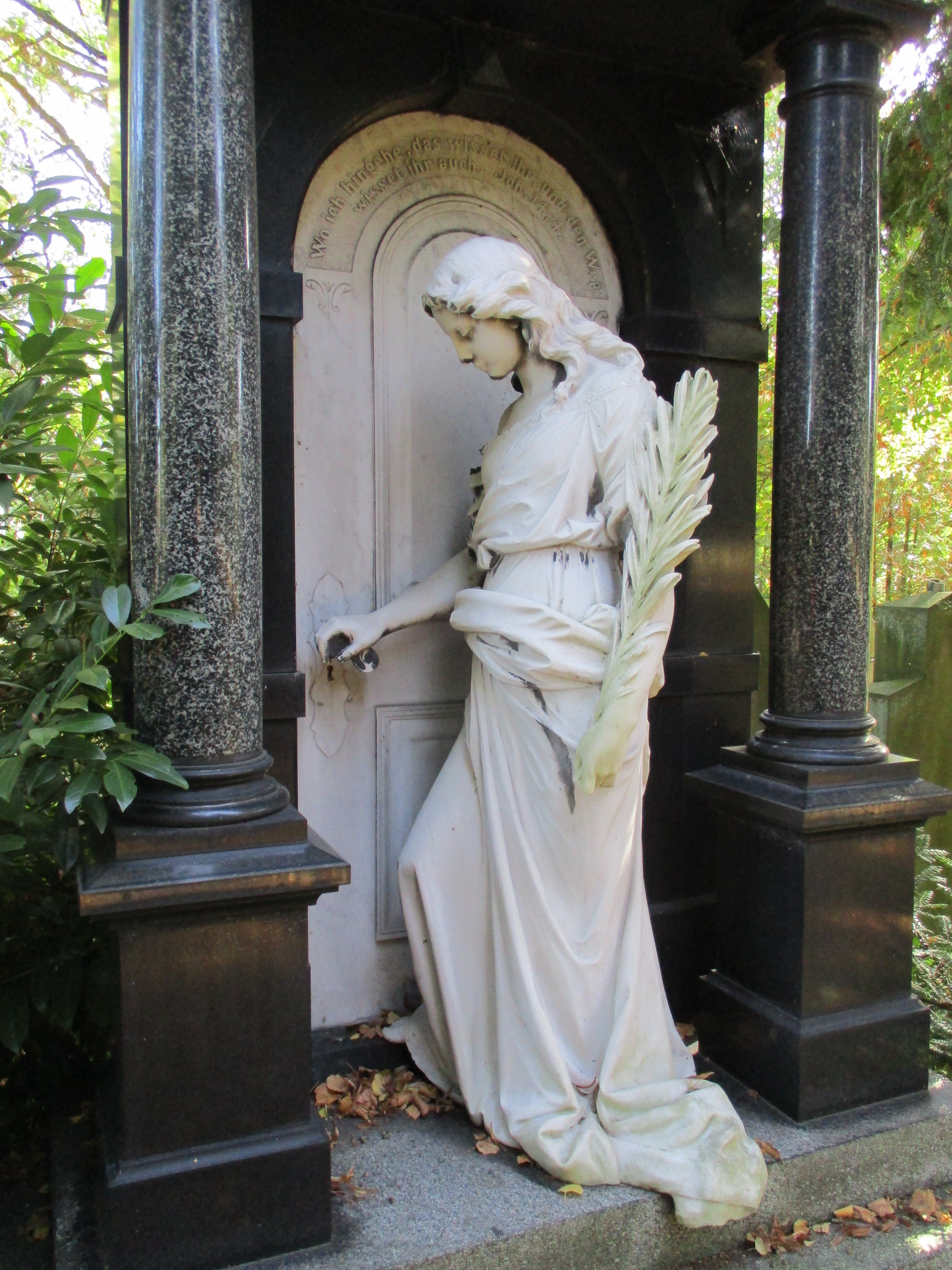 Grabstätte mit lebensgroßer Skulptur